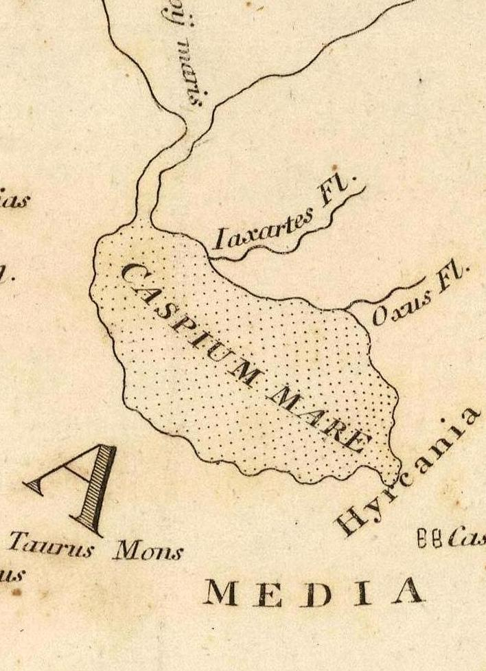 Map of the World According to Strabo (1814). Bye, J., engraver.